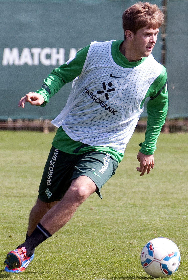 Training 06.04.2012